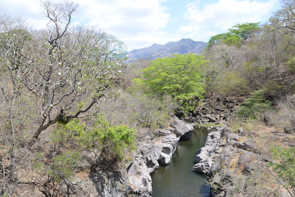 Rio en San Antonio, Achuapa, Nicaragua